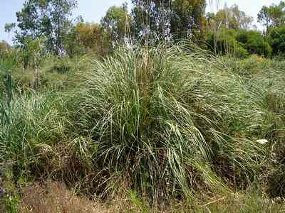 Ampelodesmos mauritanicus